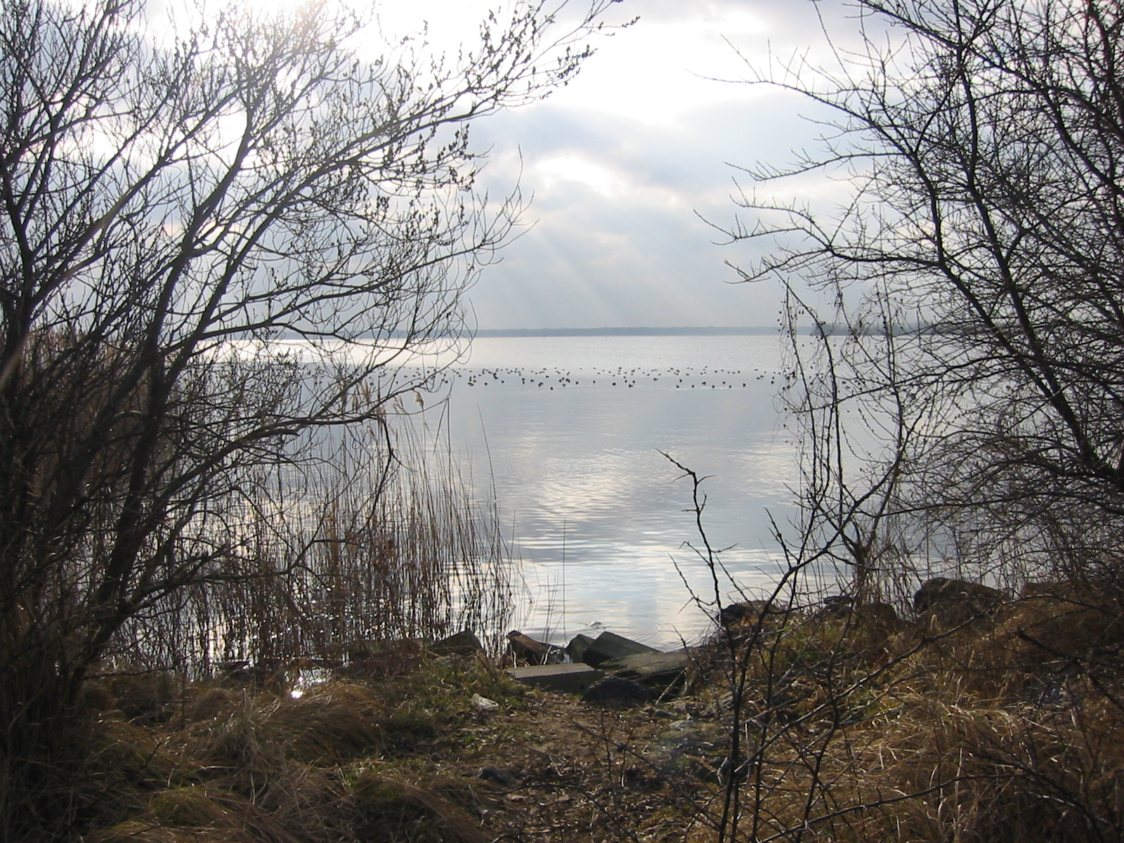 Gooimeer (Lake in the Netherlands)